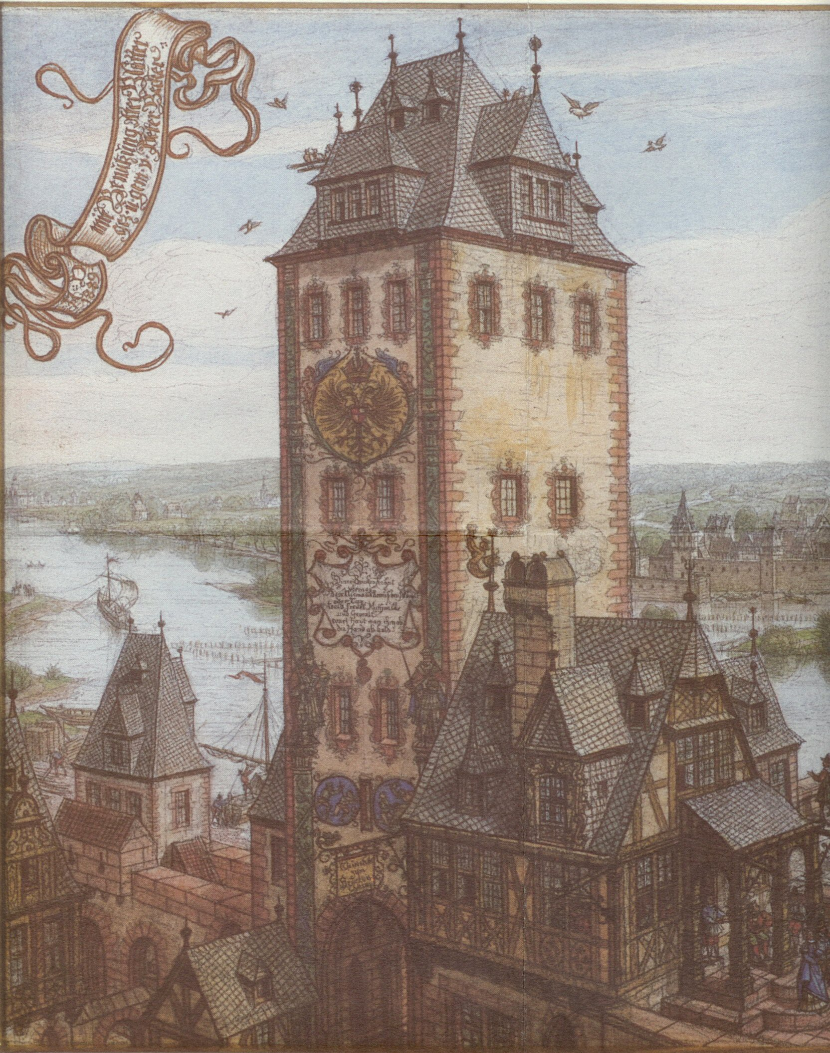 Ausschnitt aus einem Aquarell von Peter Becker, 1887 für Conrad Binding geschaffen. Privatbesitz, Frankfurt am Main